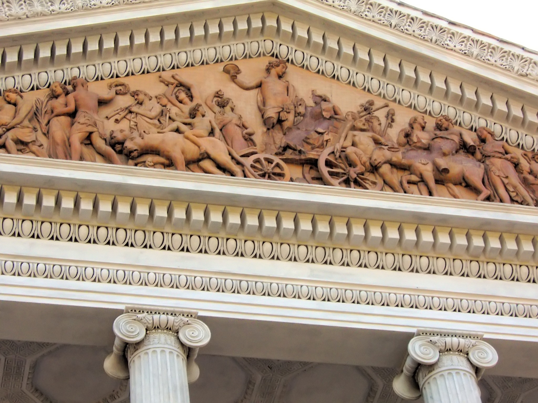 Trionfo di Bacco, di Rinaldo Rinaldi (1793-1873). Particolare della facciata della Villa Torlonia a Roma.